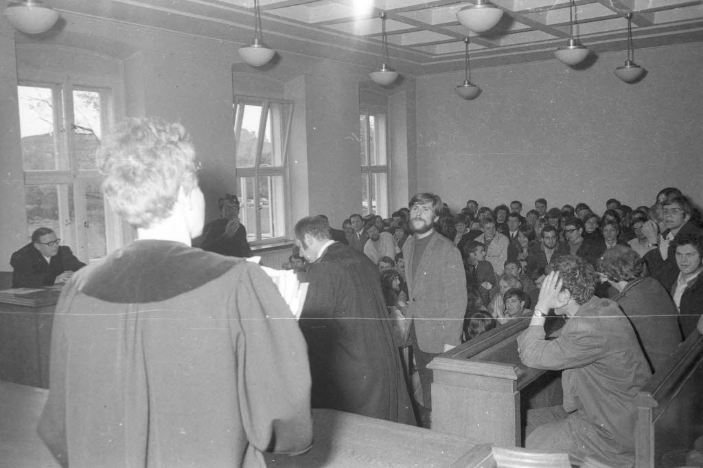 Der Ex-AStA-Vorsitzende der CAU (Mitte stehend) im überfüllten Saal des Amtsgerichts, wo wegen Hausfriedensbruchs im Zuge von Studentenunruhen gegen ihn verhandelt wird.